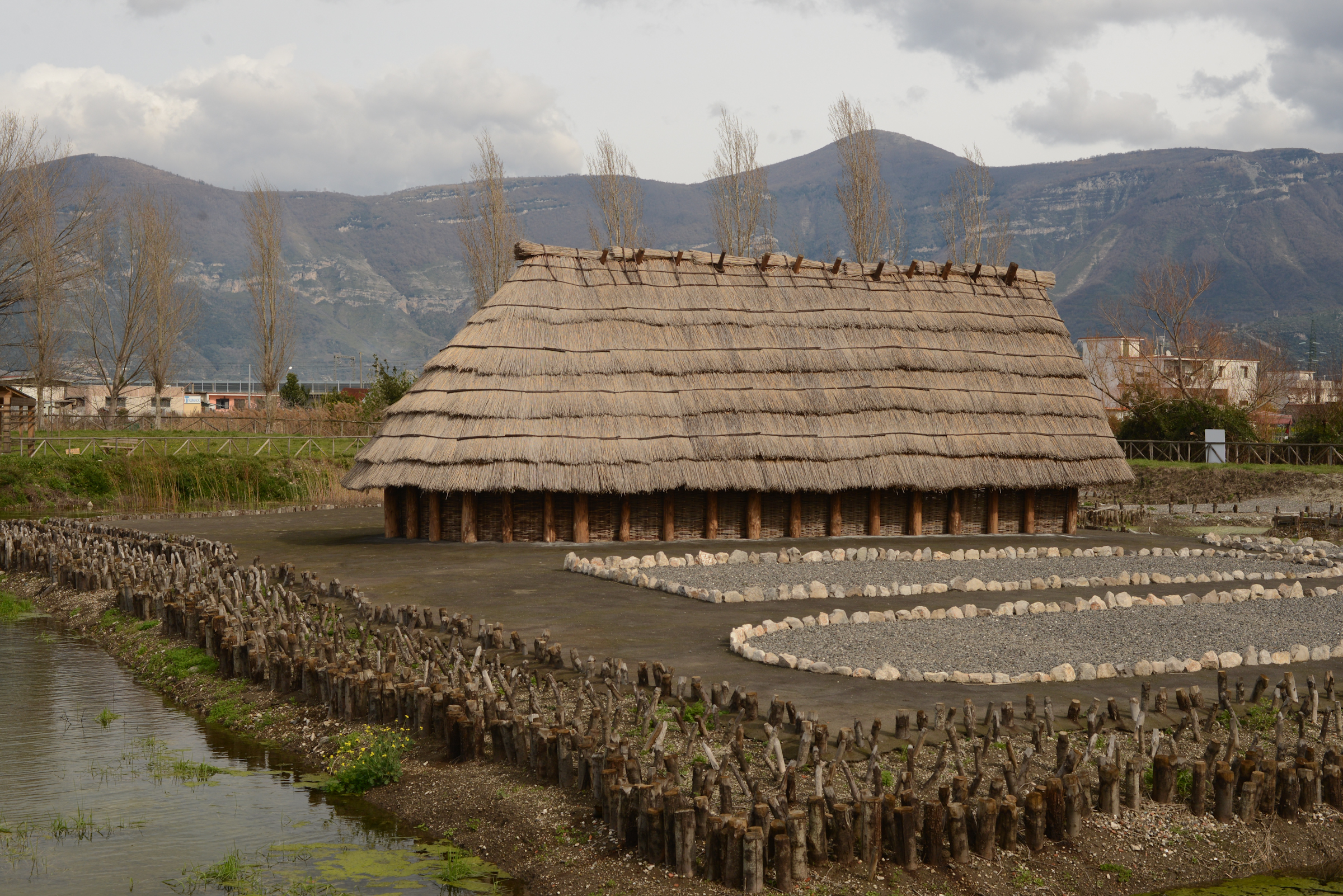 Parco archeologico del sito archeo-fluviale di Longola. Capanne del villaggio preistorico